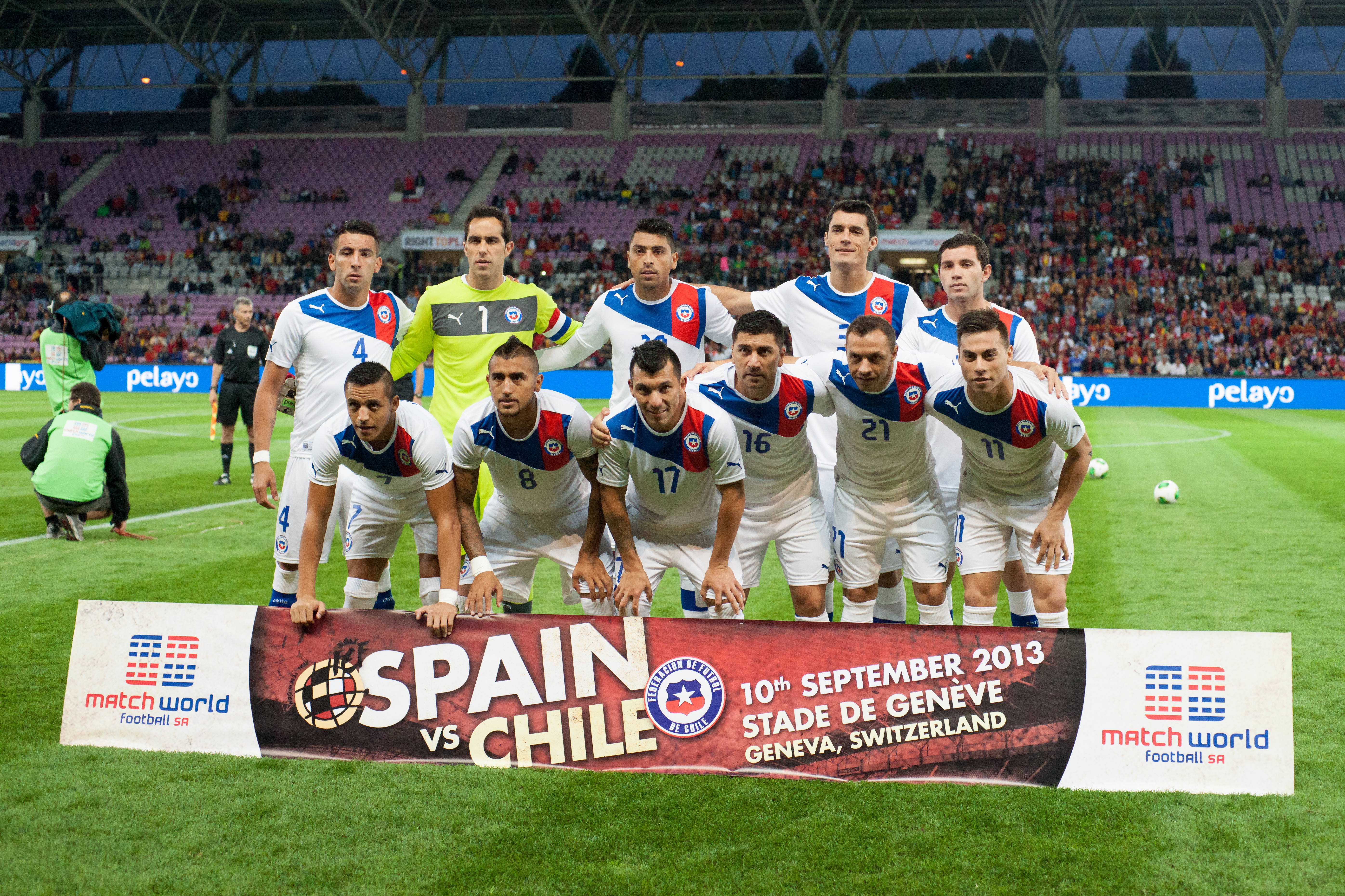 Espagne - Chili, 10 septembre 2013. Équipe du Chili. Debout : Mauricio Isla, Claudio Bravo, Gonzalo Jara, Marcos González et Eugenio Mena. Accroupis : Alexis Sánchez, Arturo Vidal, Gary Medel, David Pizarro, Marcelo Díaz et Eduardo Vargas.